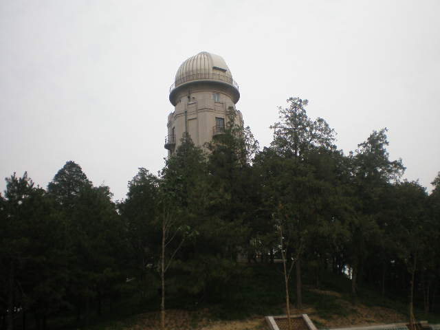 中文（中国大陆）: 清华大学天文台